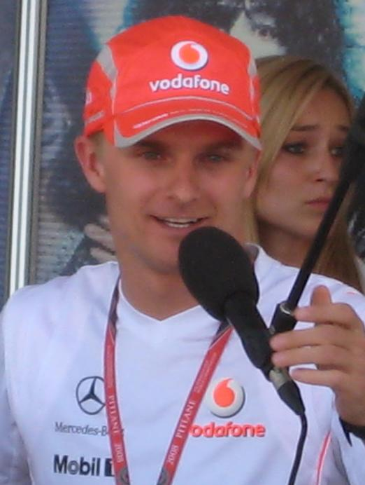 Heikki Kovalainen portrait